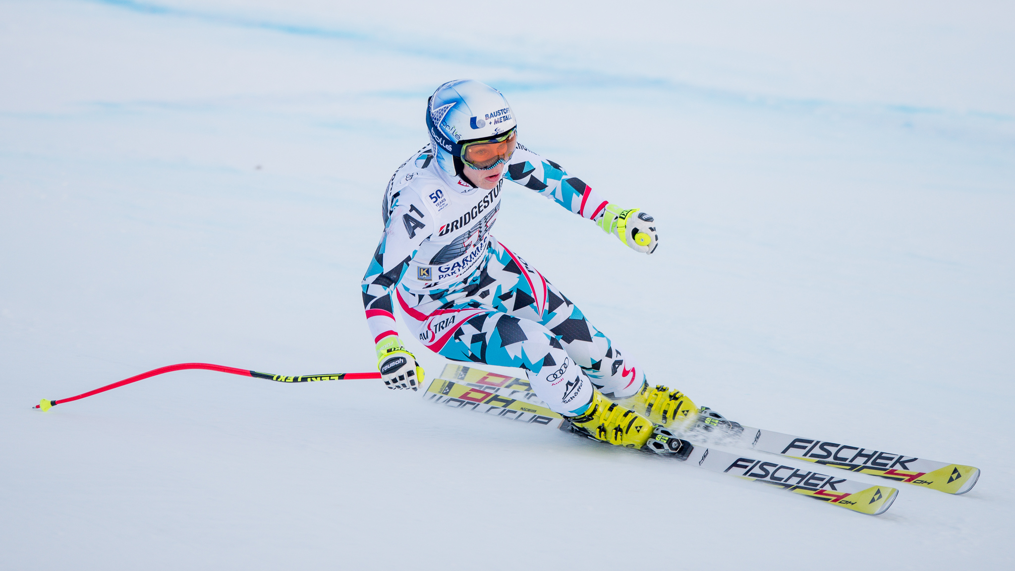 64. Kandahar Rennen,Audi FIS Ski Weltcup Garmisch-Partenkirchen,Damen Abfahrt,Kandahar,Ladies Downhill,Nicole Schmidhofer